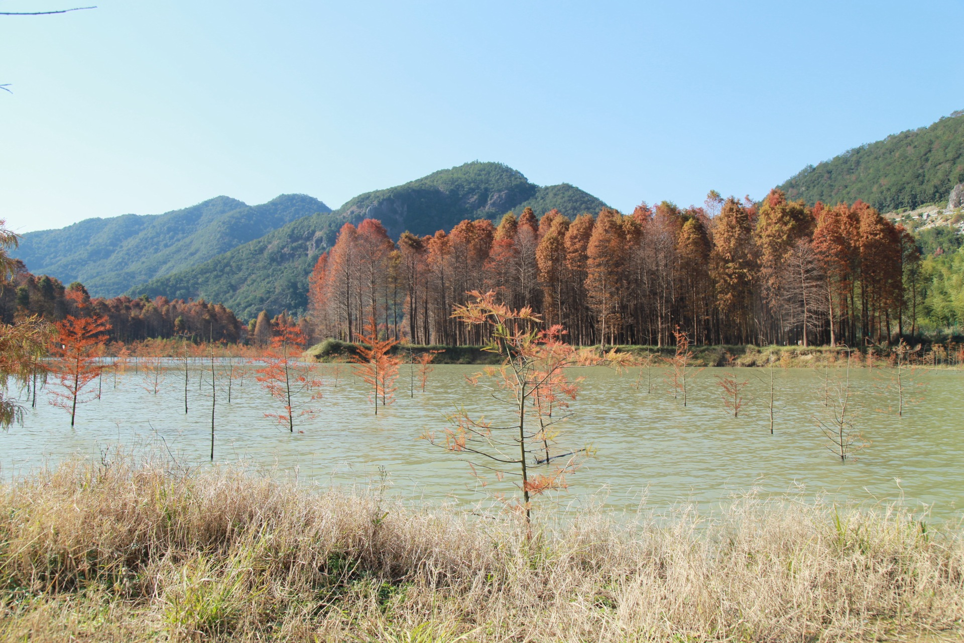 临海桐坑村红树林风光